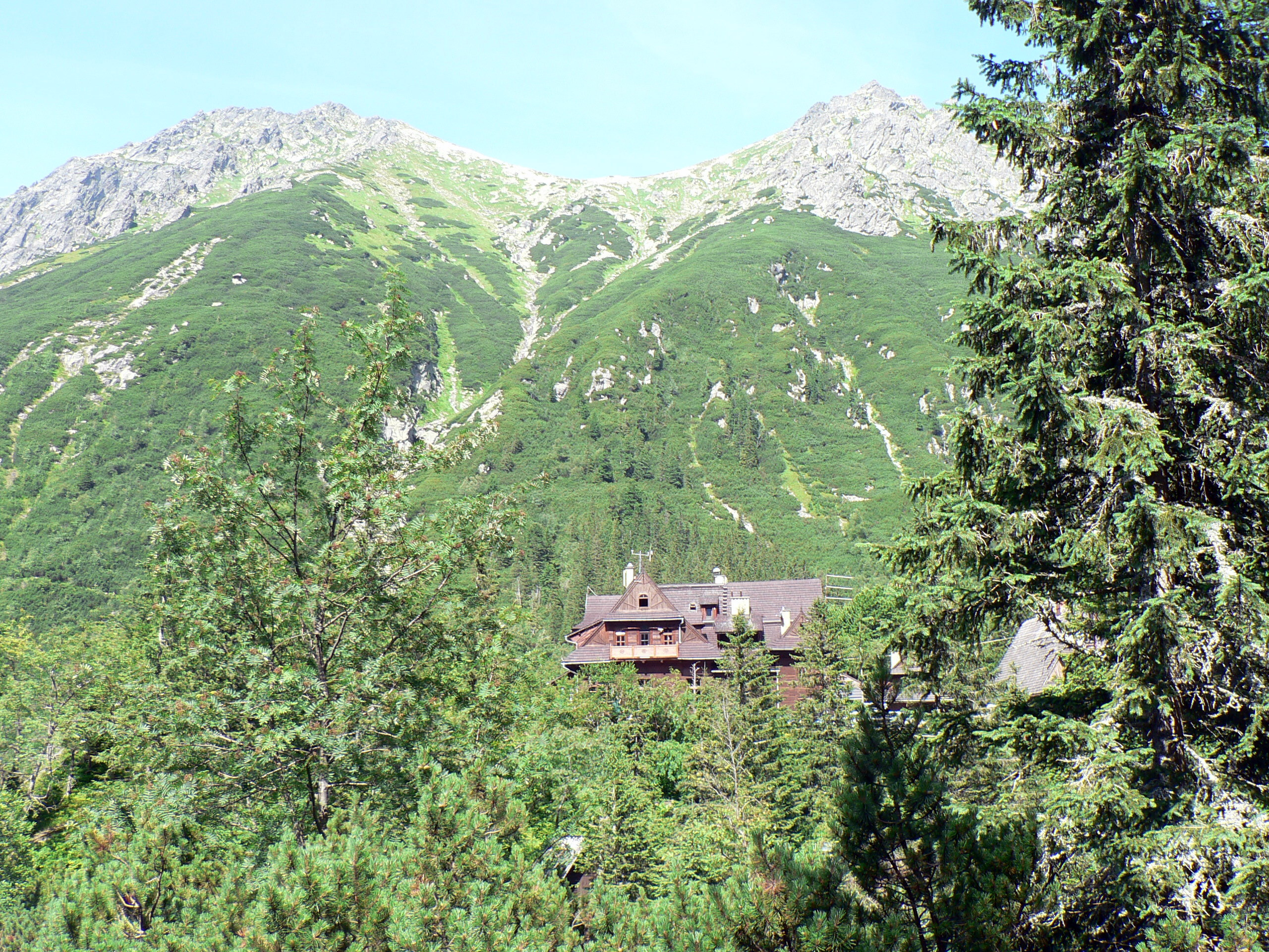 Miedziane i Opalony Wierch znad Morskiego Oka